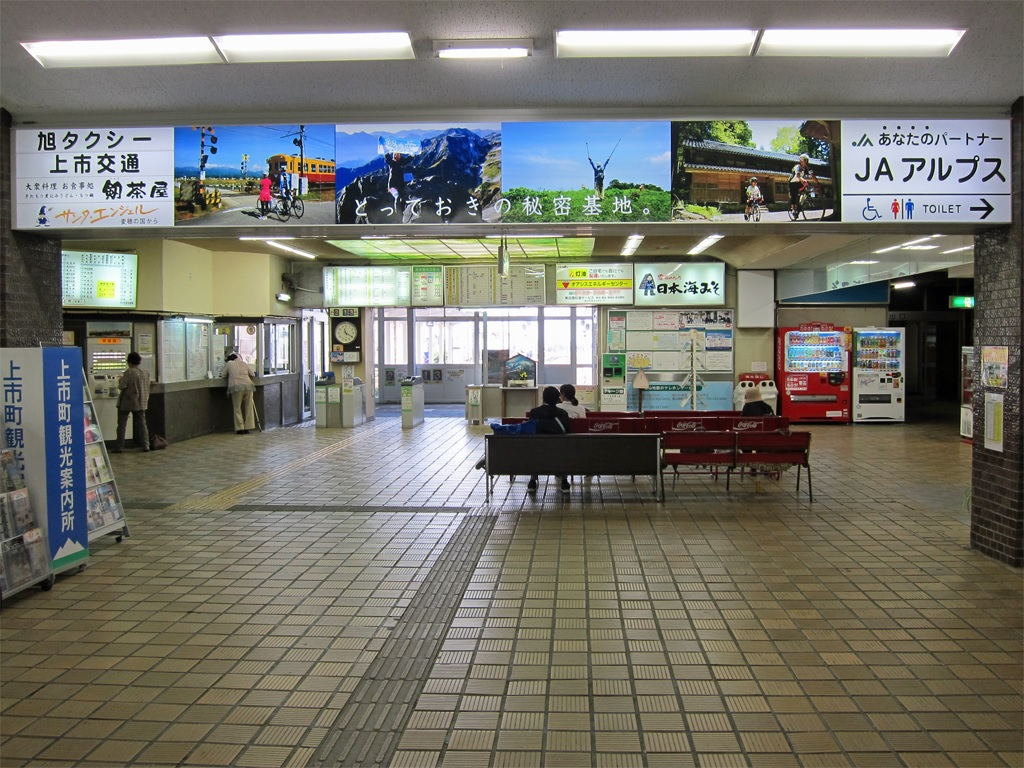 富山地方鉄道本線上市駅駅舎内